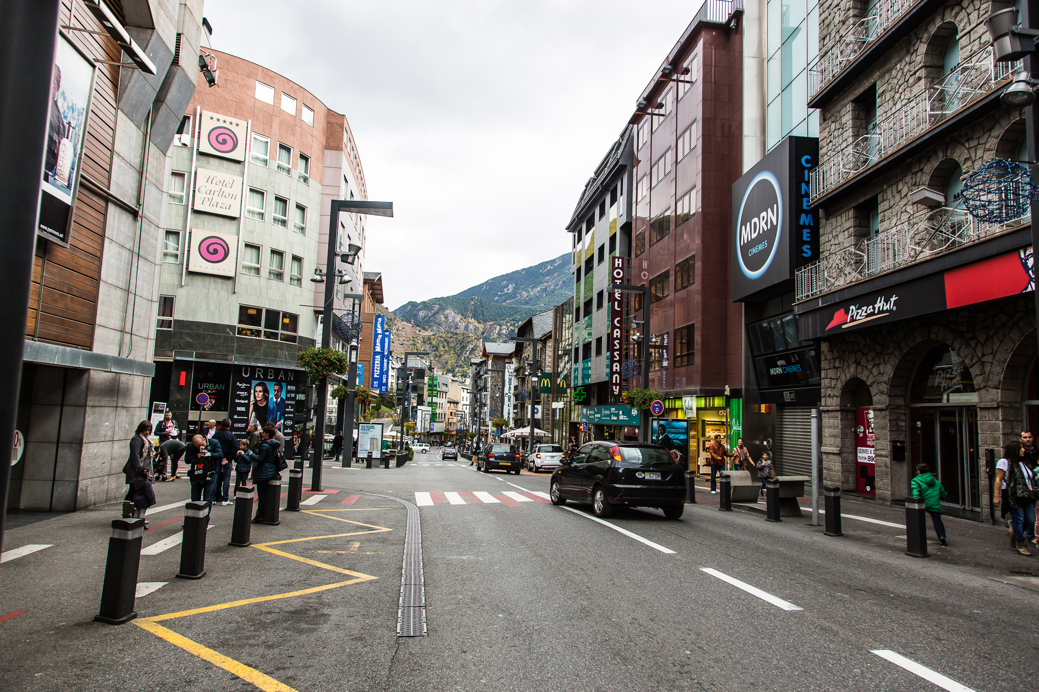 Andorra